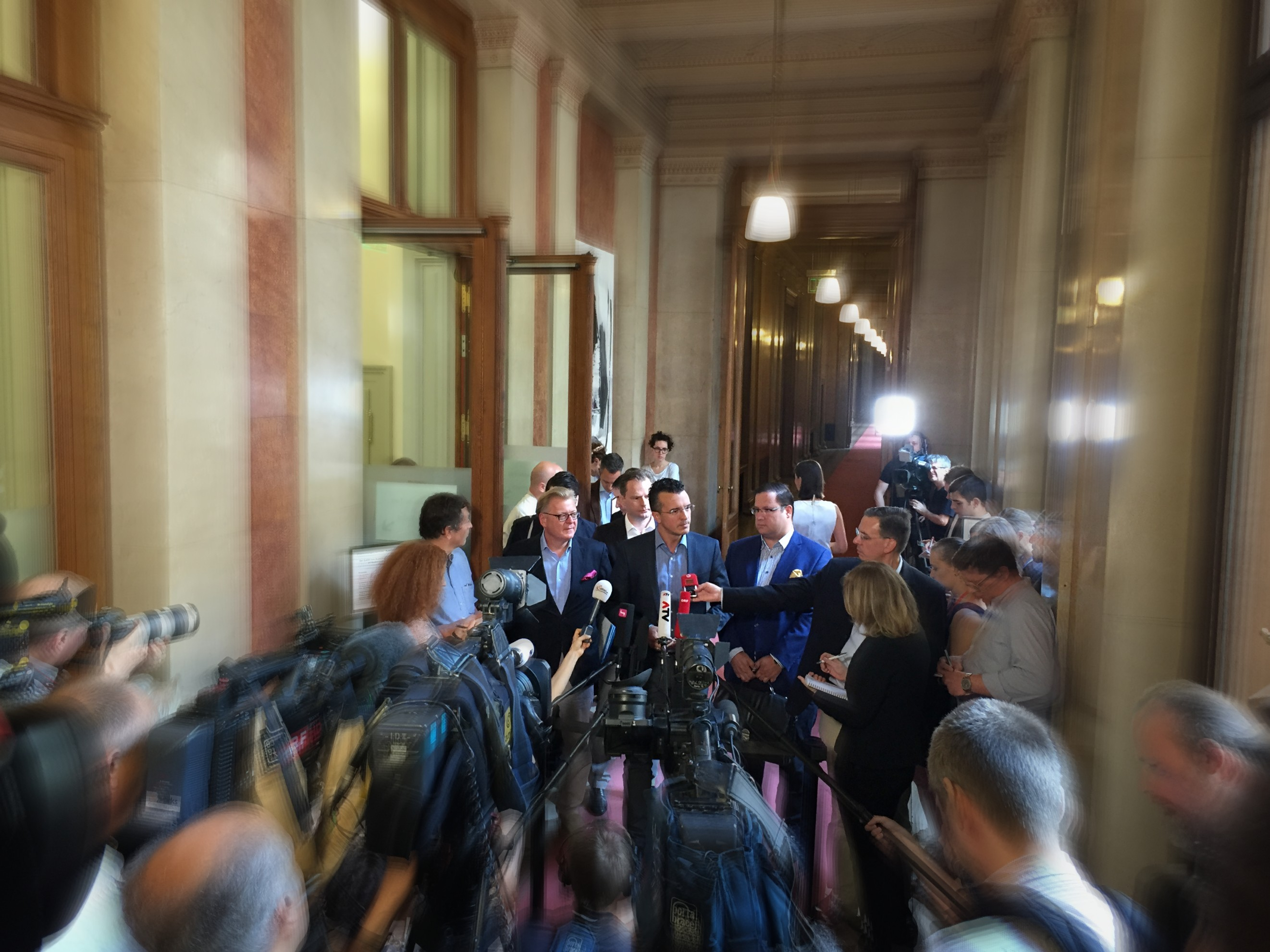 FPÖ Fraktionsführer NR Mag. Gernot Darmann und sein Stellvertreter NR Christian Hafenecker, MA beantworten Medienfragen zum Untersuchungsausschuss Dezember 2015